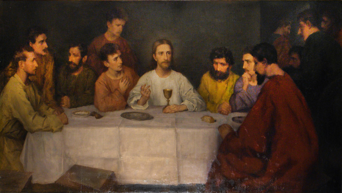 Das Abendmahl von Mathilde Block (Öl auf Leinwand, 173 × 69 cm), 1906. Von Mathilde Block gestiftet als Altarbild für die St.-Anna-Kirche in Niendorf a. d. St. (Wurde 1964 aus der Kirche entfernt)